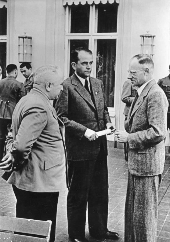 Zentralbild Arbeitsbesprechung der Schulungsbeauftragten der NSDAP am 4.8.1942 auf der "Schulungsburg" in Berlin-Wannsee. UBz: v.l.n.r.: Reichsorganisationsleiter der NSDAP Dr. Robert Ley, Reichminister für Bewaffnung und Munition Albert Speer und Staatssekretär im Reichsernährungsministerium Dr. Herbert Backe während einer Beratungspause.